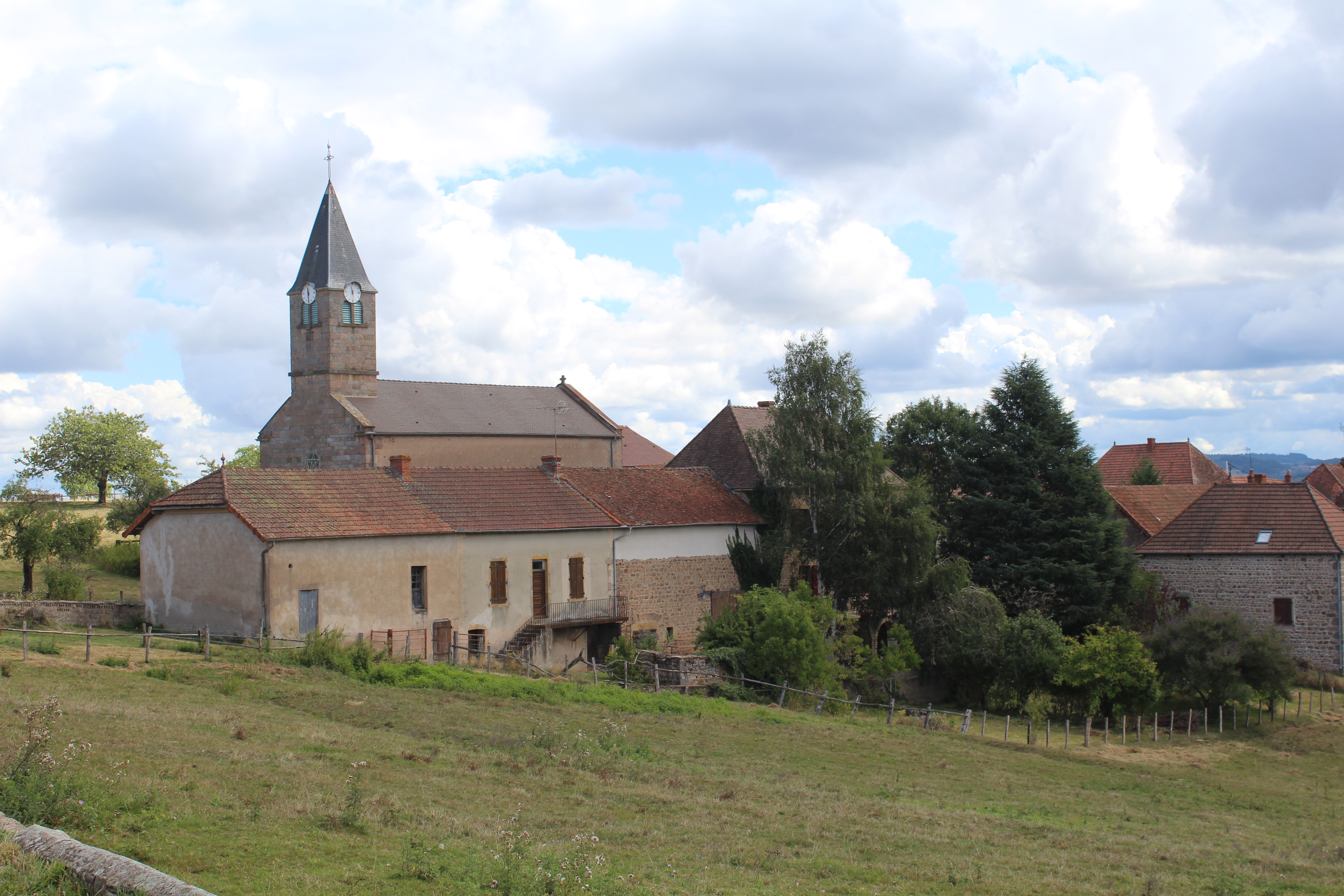 Église de l'Assomption de Sivignon.